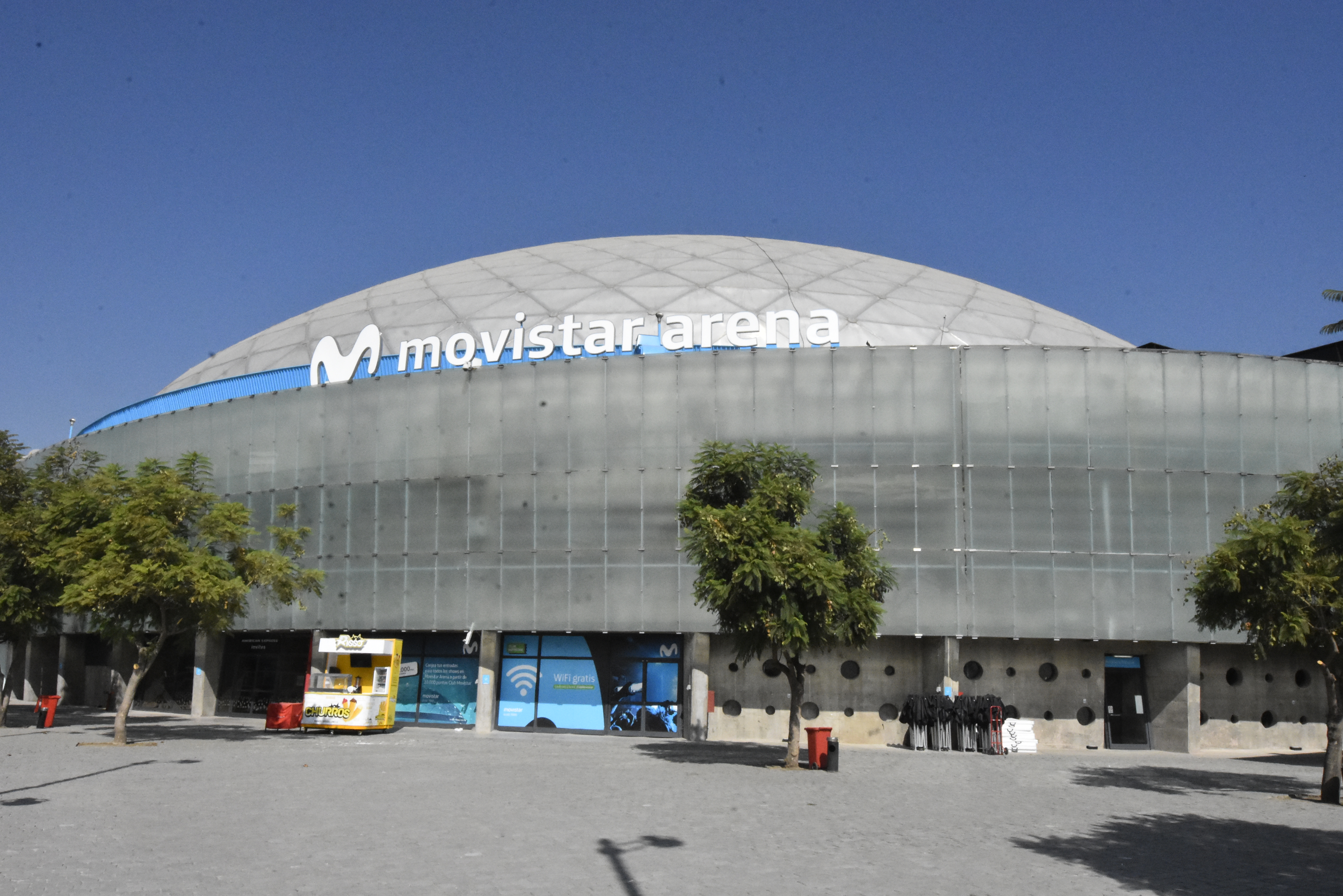 Imagen de Movistar Arena 2018